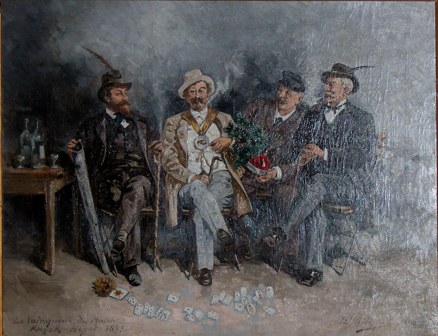 "Le vainqueur du match" (1895) ; gemeentelijk patrimonium Knokke-Heist, BelgIê